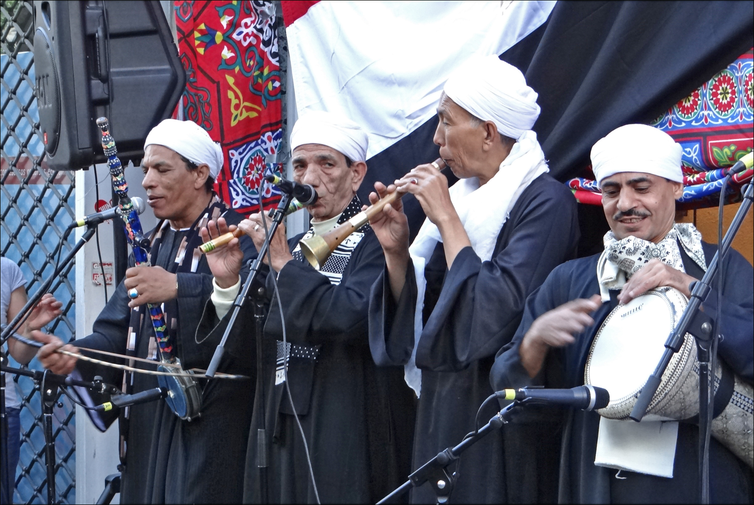 Les instrumentistes des Percussions nubiennes (Nubian Drummers) devant le centre culturel d'Egypte Boulevard Saint Michel, Paris Fête de la musique 2012 De gauche à droite, joueurs de Rebab, de ney (?) (flûte oblique), de mizmar (hautbois), Site du centre culturel d'Egypte (Paris)